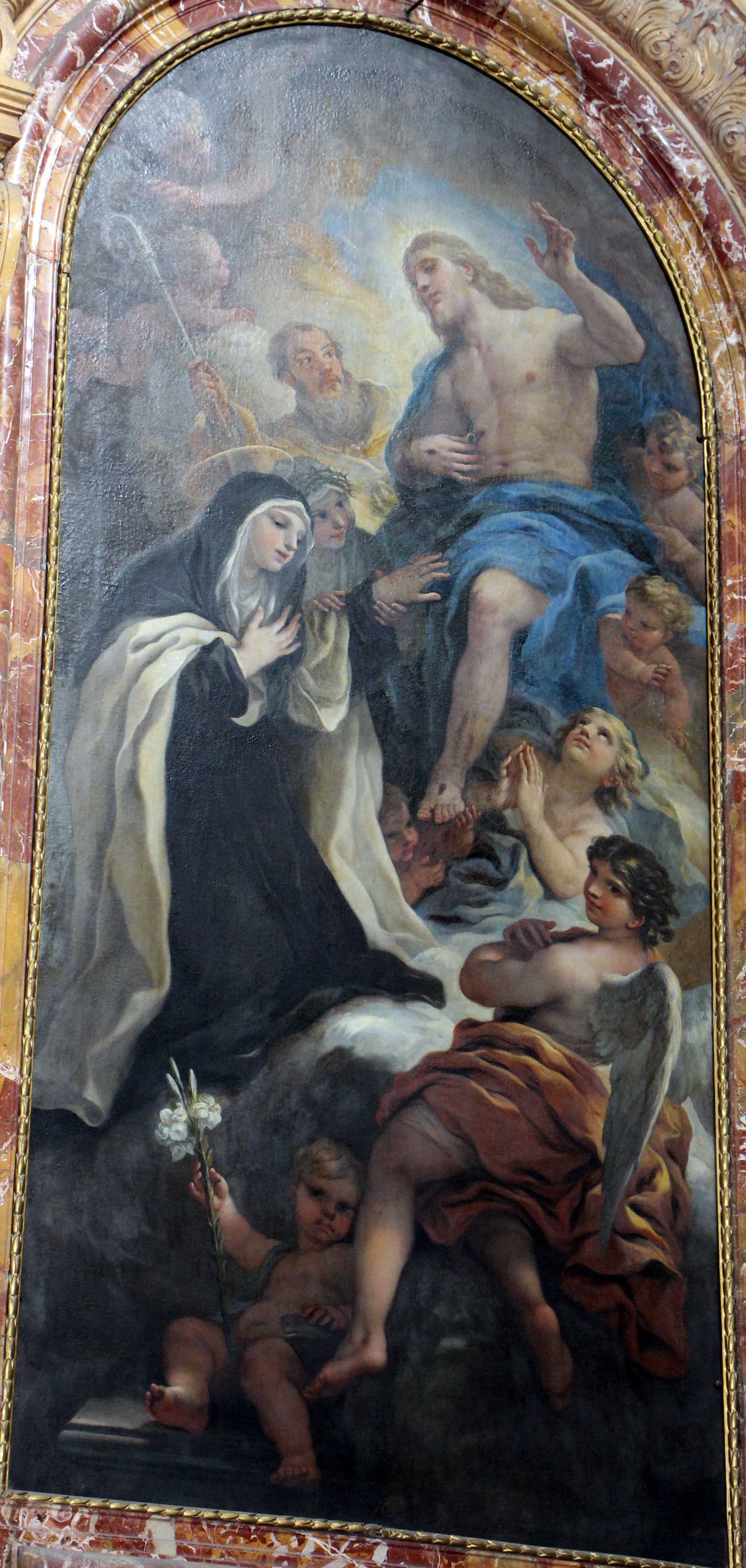 Santa Maria Maddalena de' Pazzi (Firenze) - Cappella Maggiore